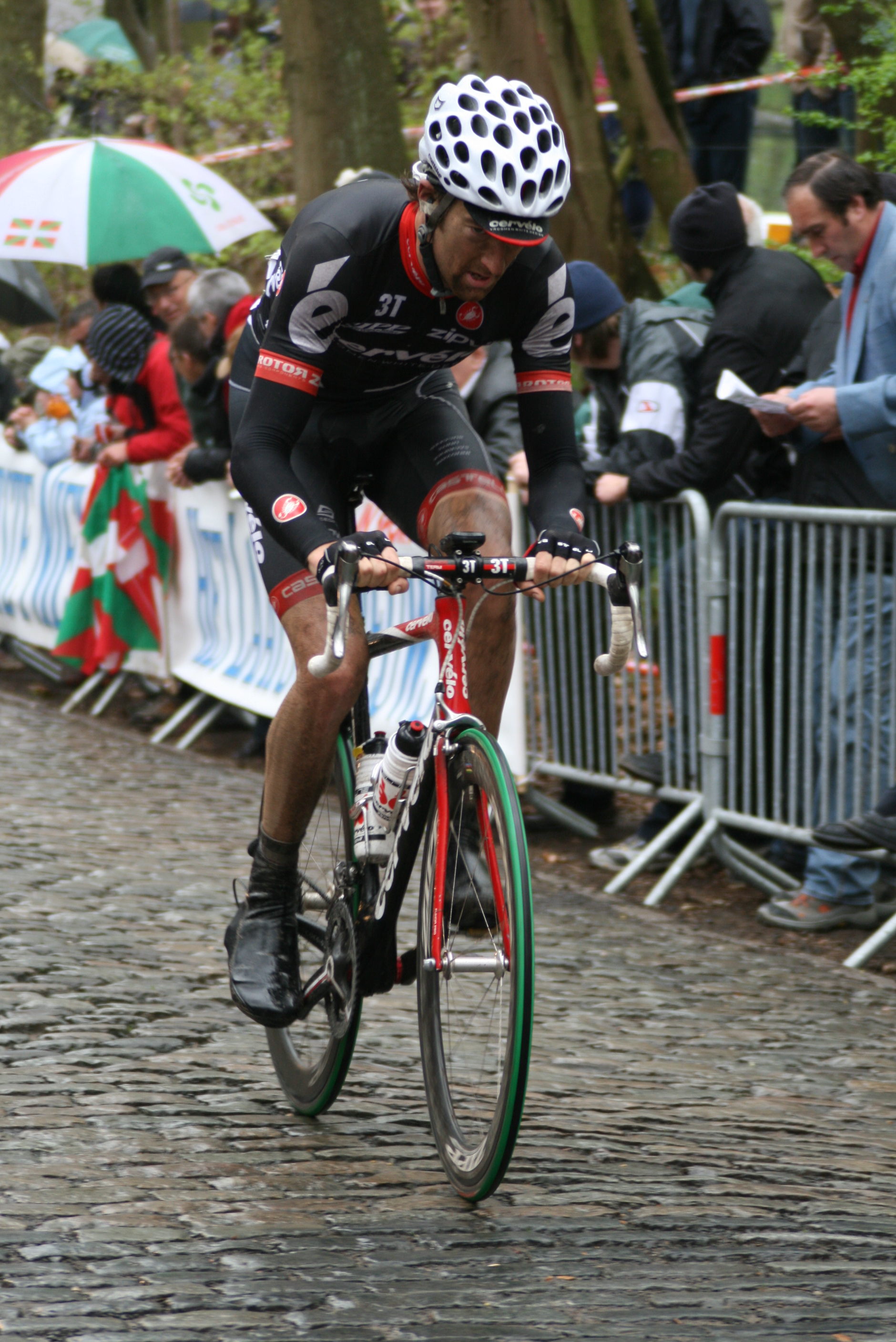 Gent-Wevelgem 2009 : Daniel Lloyd au mont Kemmel